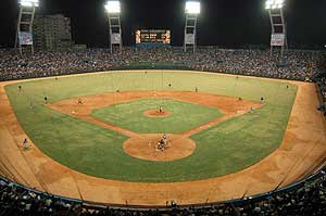 Estadio Latinoamericano de Cuba.